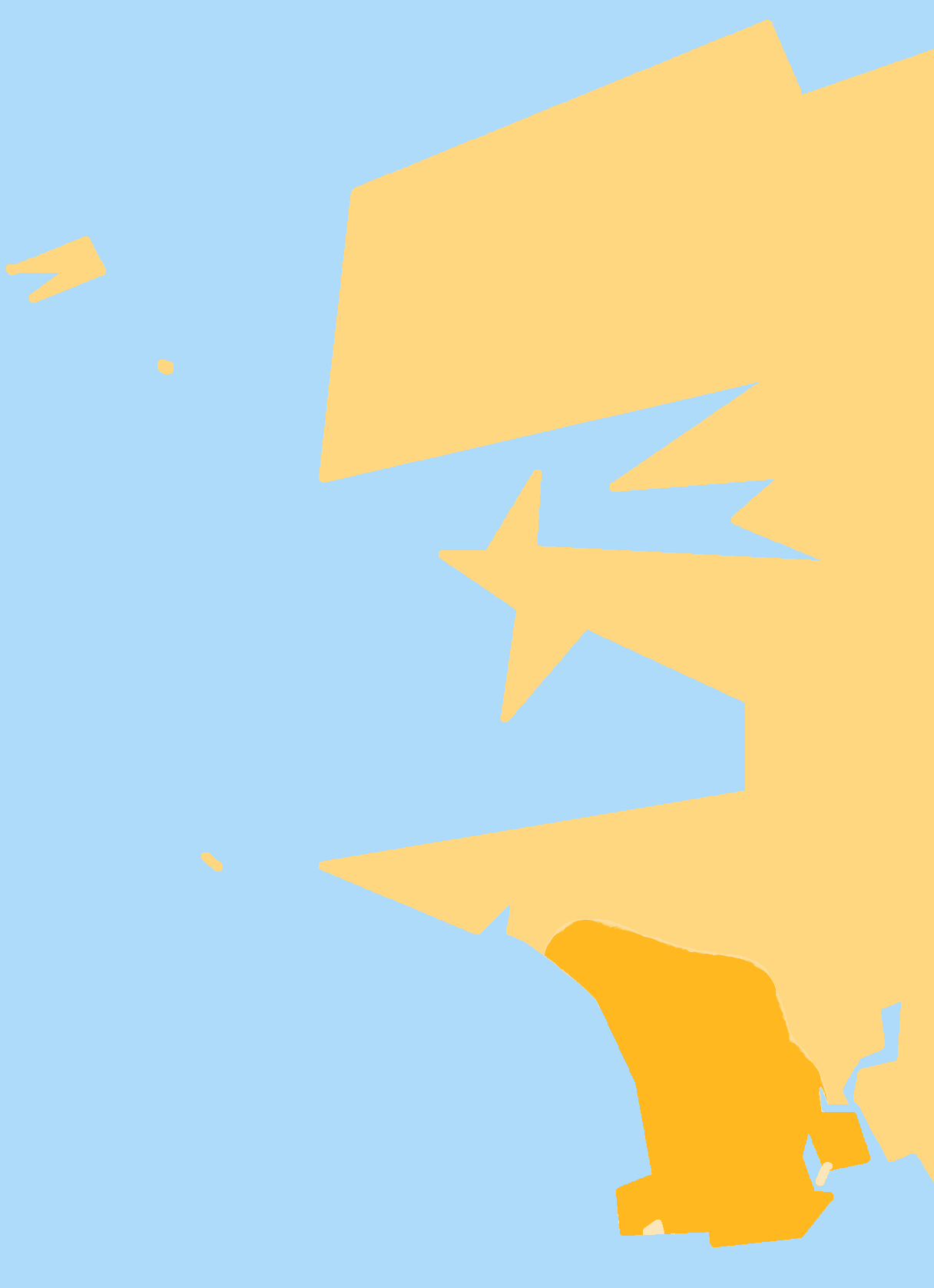 Situation du pays Bigouden (en rouge) à la pointe de la Bretagne.